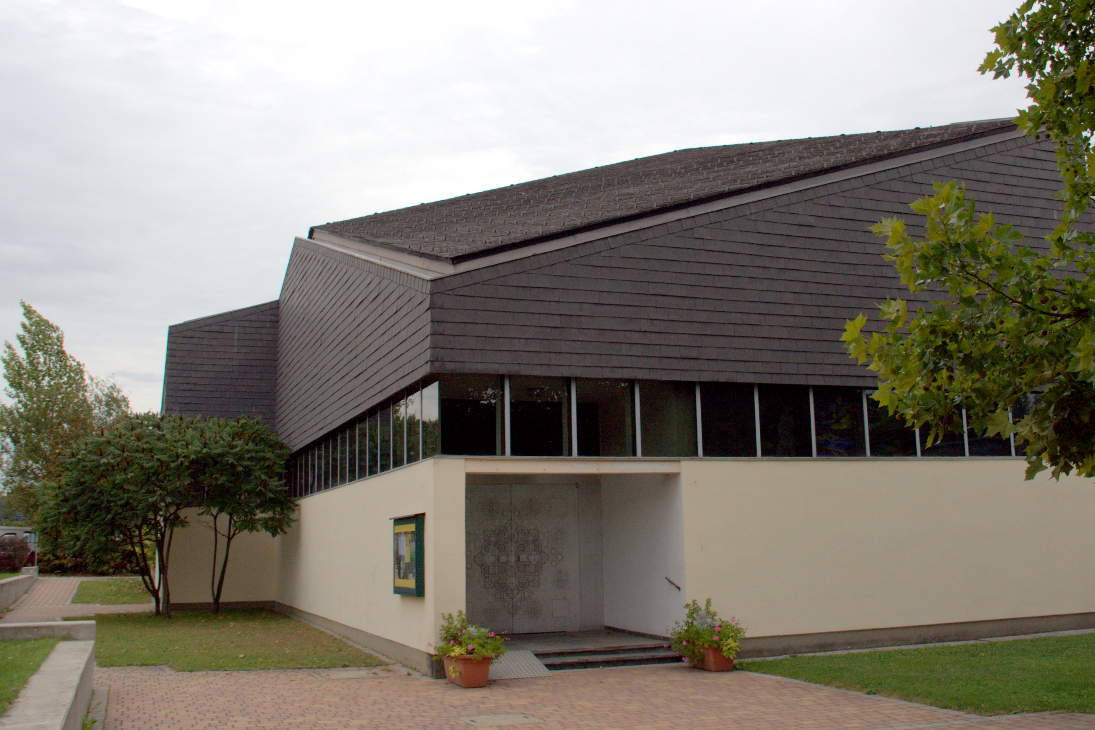 Kath. Pfarrkirche hl. Leopold. Die Türflügel mit dem Titel Urzelle stammen von Fritz Hartlauer aus dem Jahre 1971.